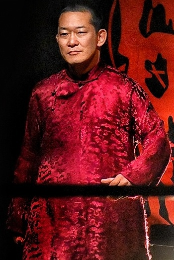 プロレスラーの趙雲子龍